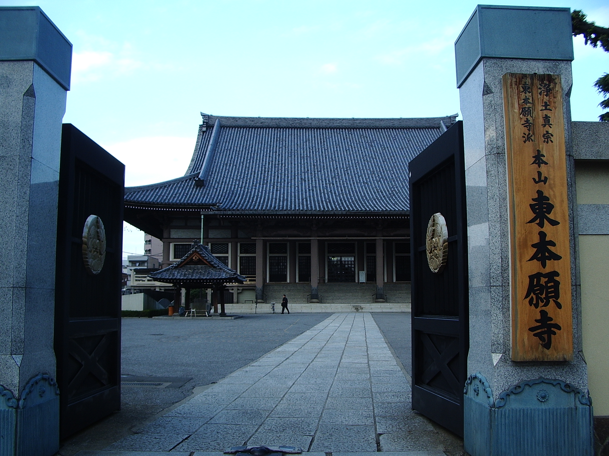 東本願寺（東京都台東区）